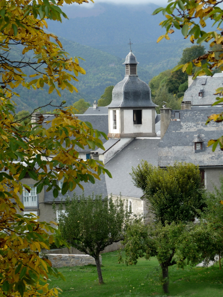 Église paroissiale Notre-Dame de Gouaux